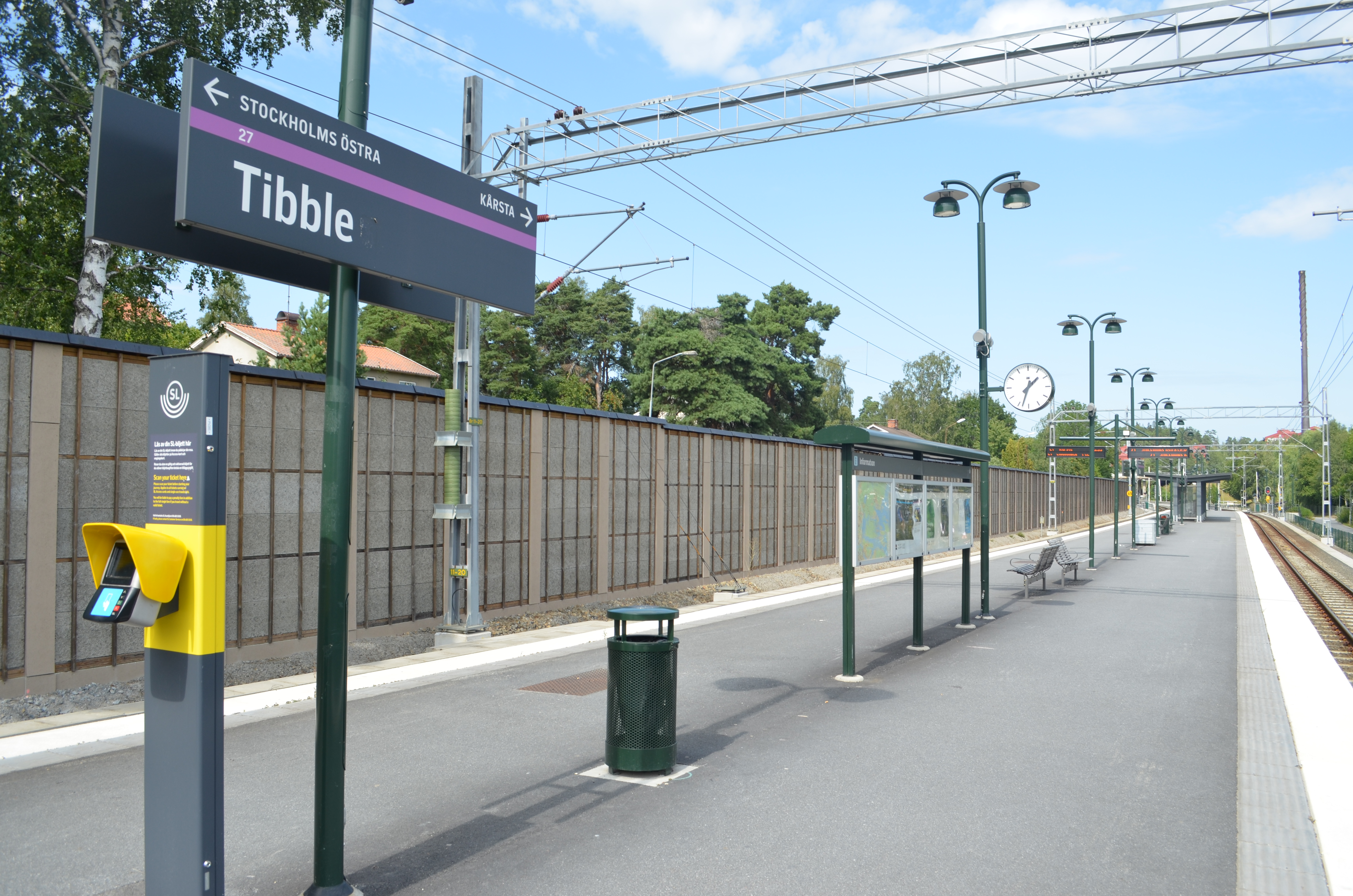 Tibble station